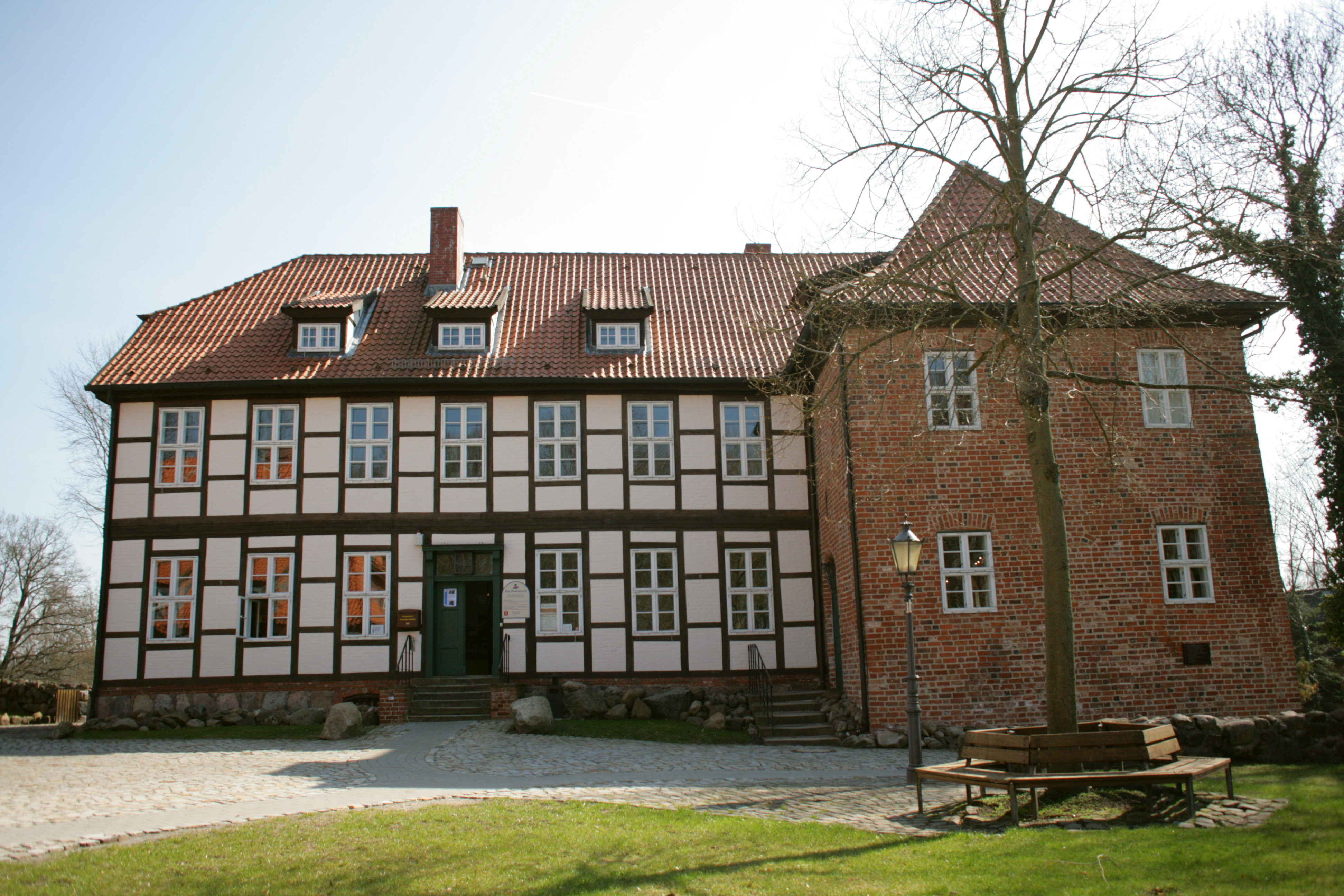 Herrenhaus mit Tourist-Information, Burg Bodenteich, Burgstraße in Bad Bodenteich